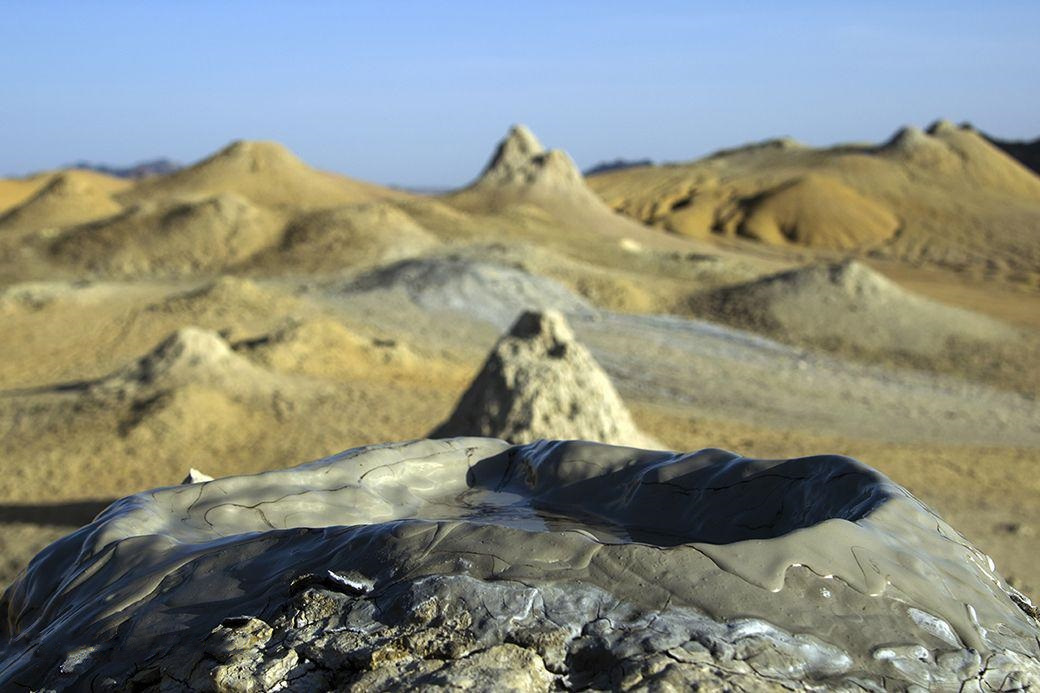 گل افشان پيرگل گل افشان پيرگل در 76 كيلومتري شهرستان خاش با ارتفاع يك هزار و 653 متر بين حصار كوه هاي تفتان نمونه اي بي بديل از آفرينش را در اين منطقه به نمايش مي گذارد، گل فشان پدیده ای طبیعی وهمانند آتشفشان است كه به صورت تپه ای مخروطی بوده و به جای گدازه، از دهانه آن گاز همراه با گل خارج می شود.